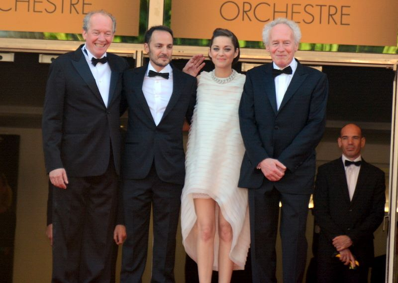 L'équipe du film "Deux jours, une nuit" au festival de Cannes : de gauche à droite, Luc Dardenne, Fabrizio Rongione, Marion Cotillard, Jean-Pierre Dardenne.